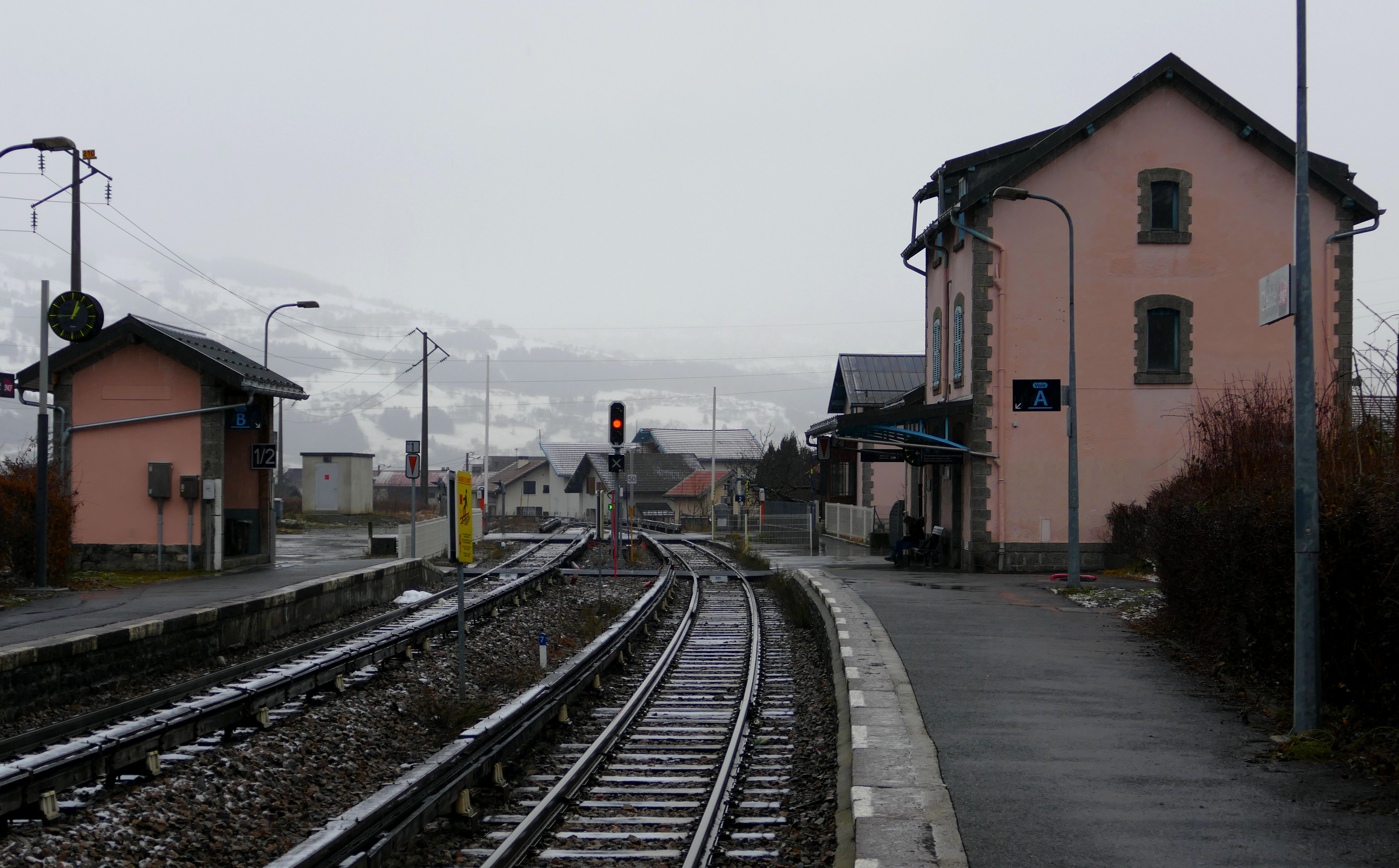 Gare de Chedde, vue en direction du Fayet